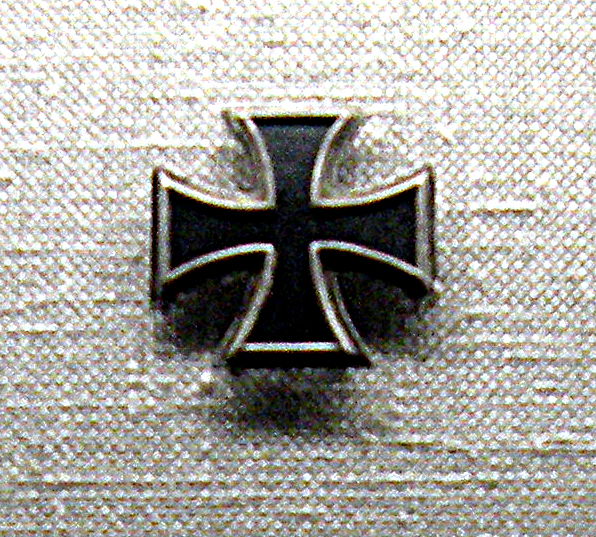 Крест 1813 года (Первого класса).(Steckkreuz )Экспонат Баварского военного музея.Ингольштадт